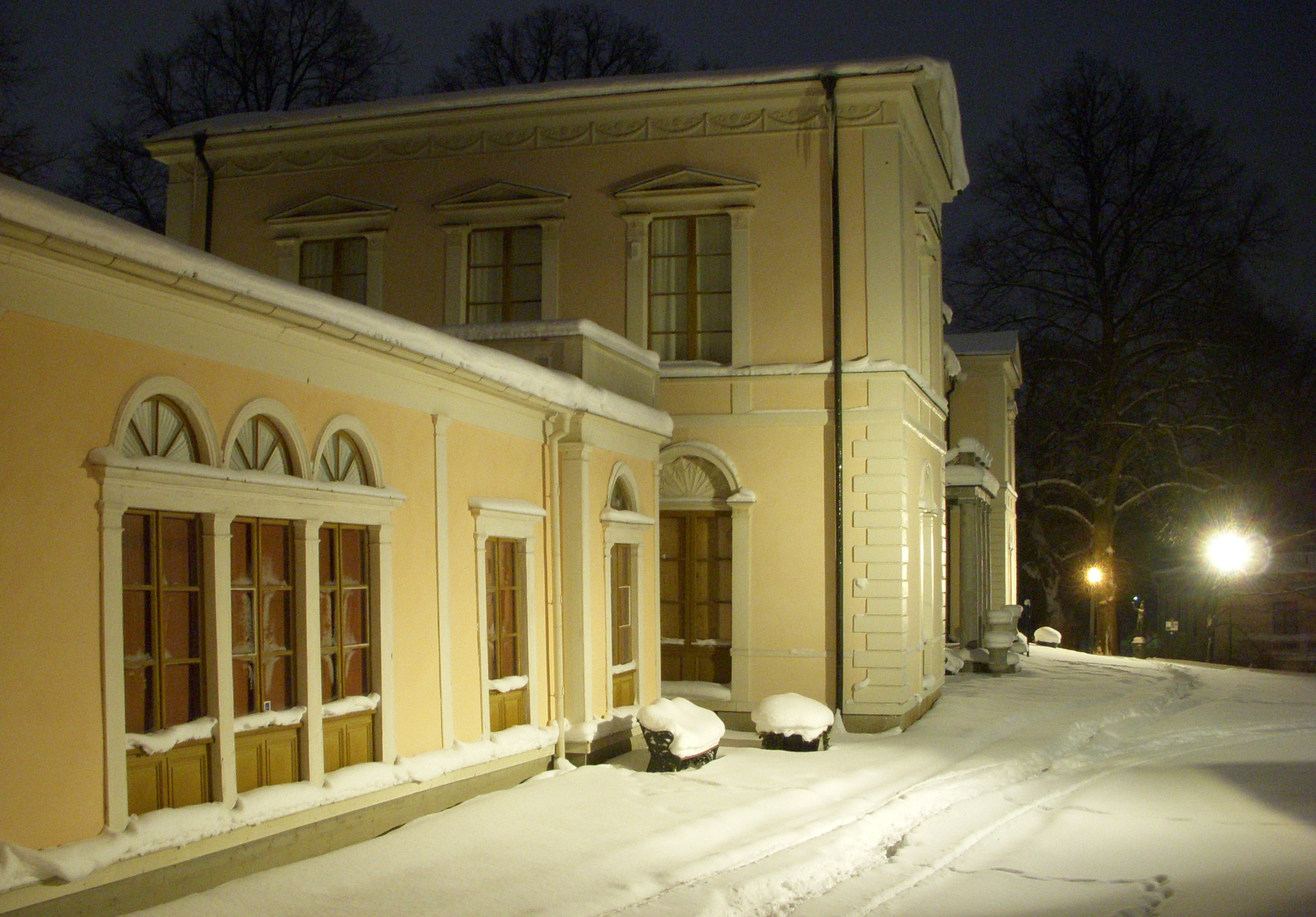 Rosendals slott på Djurgården